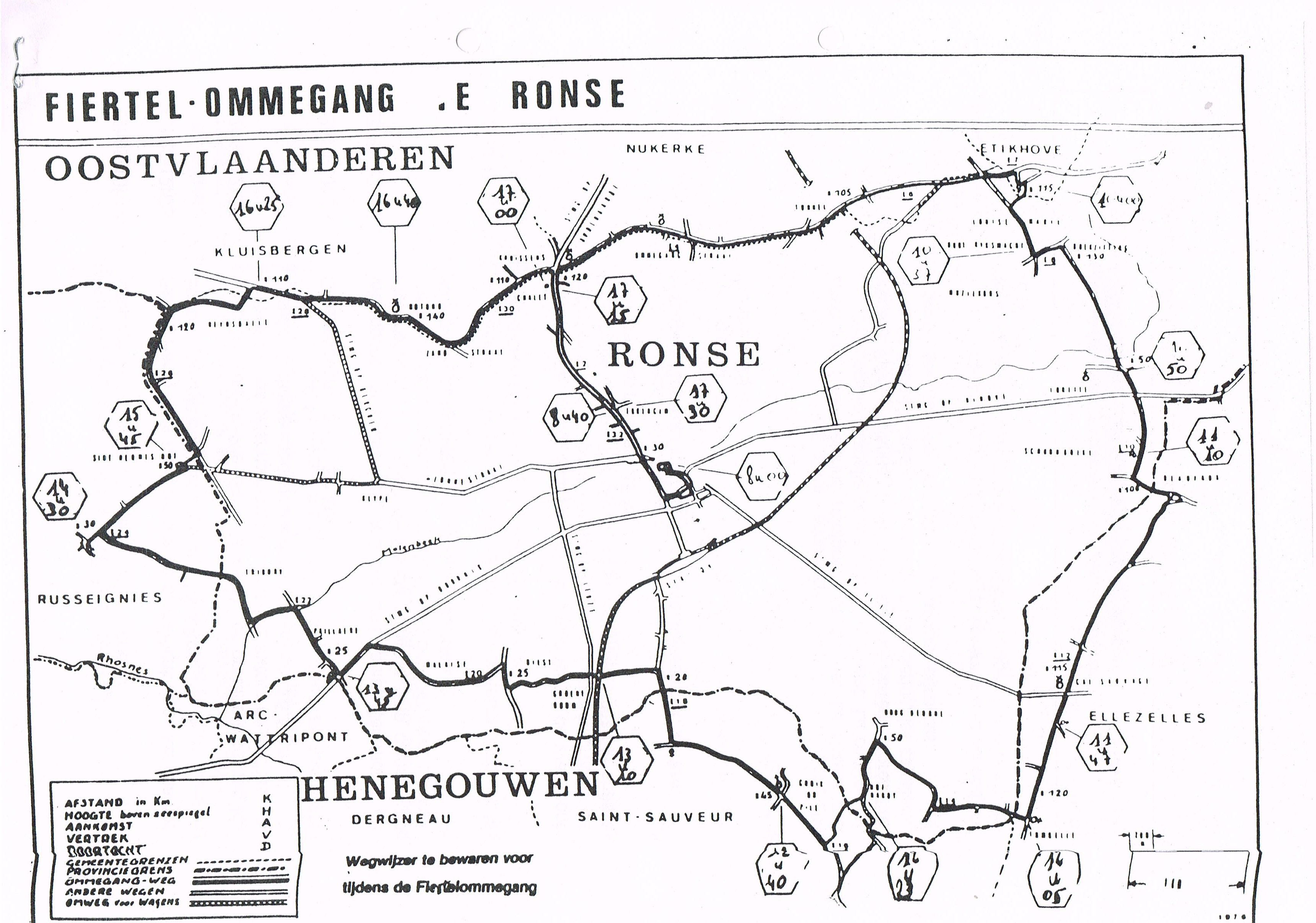 Voici le parcours (32,6 kilomètres) de la procession du Fiertel qui se déroule à Renaix.